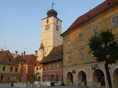 Sibiu, Romania